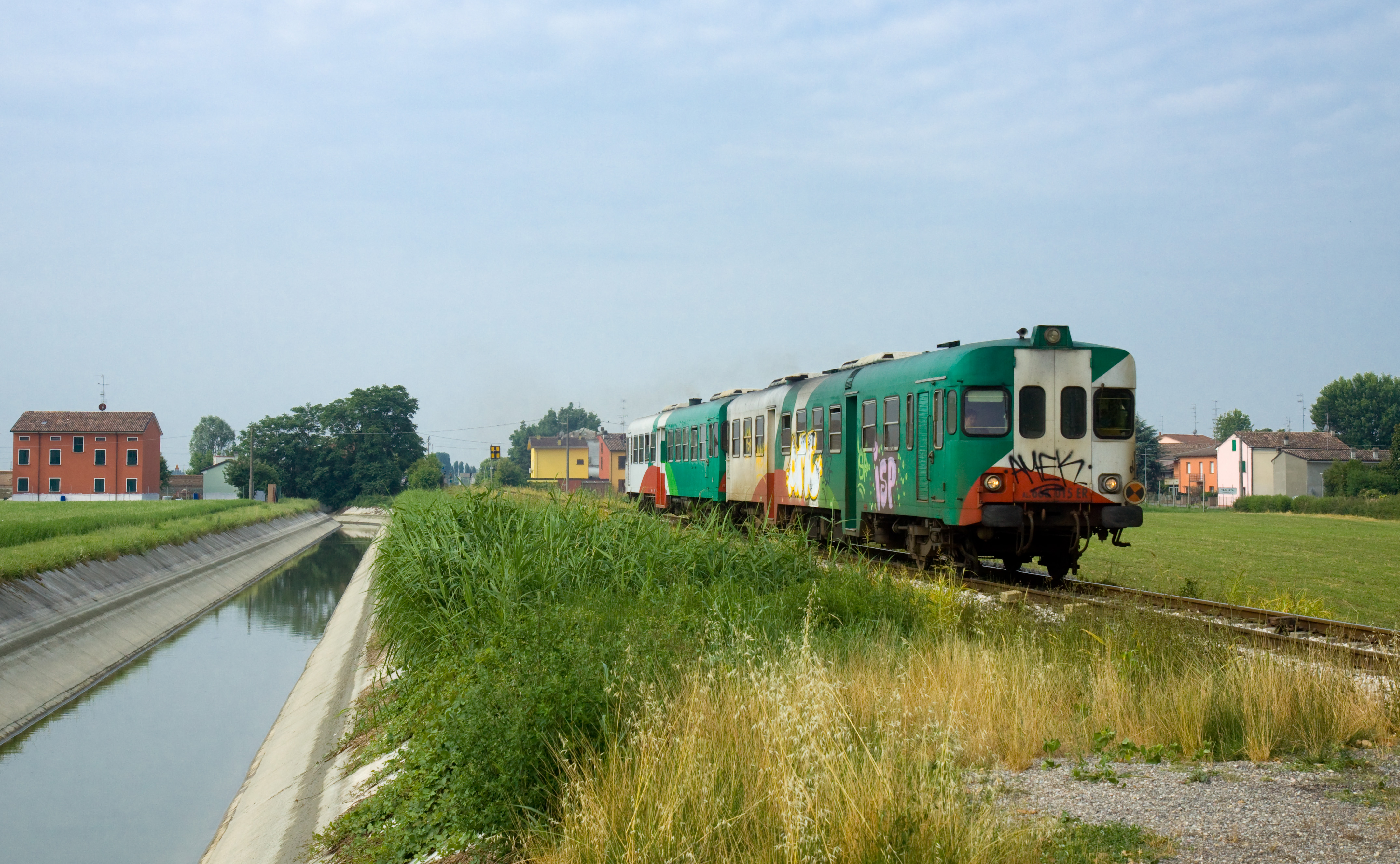 Treno FER sulla linea Parma-Suzzara presso Luzzara. In testa la ALn 668.015